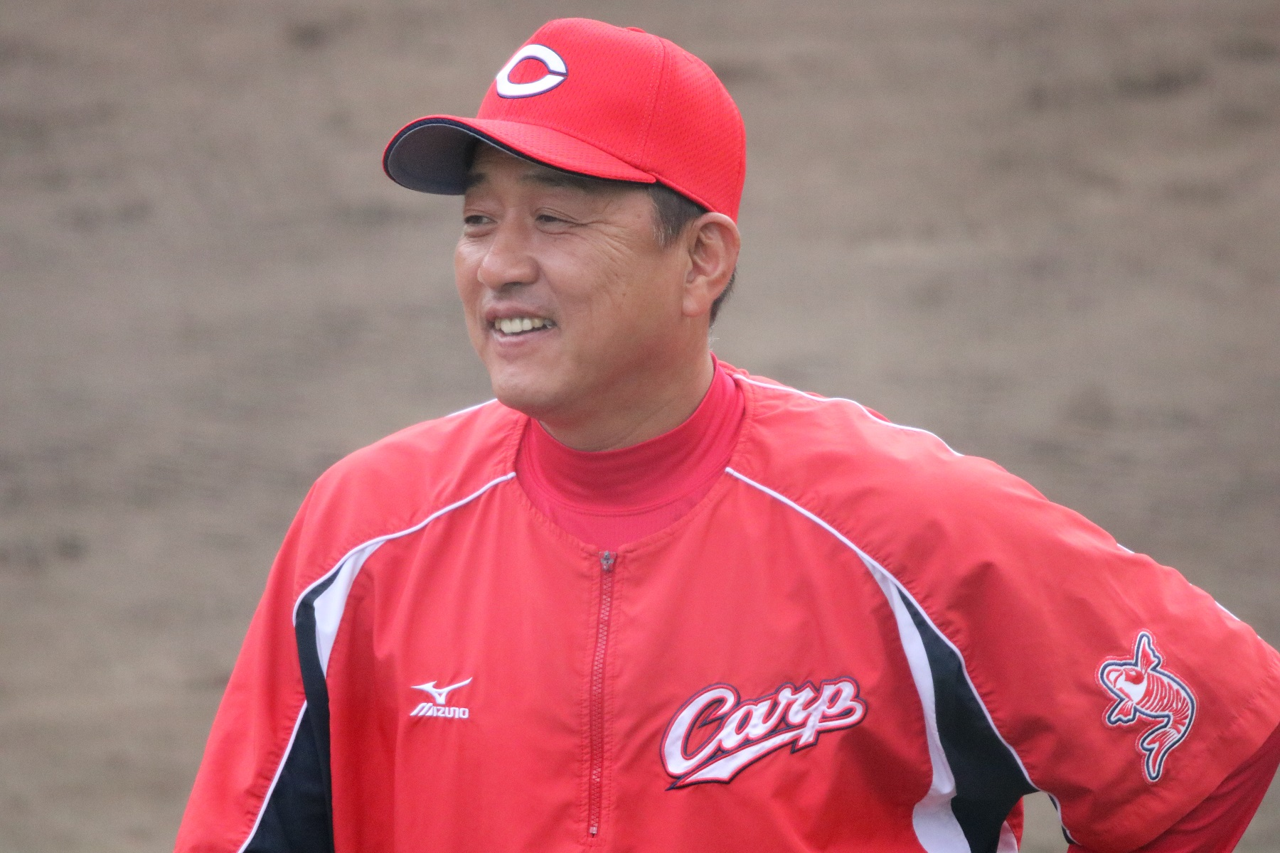 2017/11/10 秋季キャンプ(天福球場)